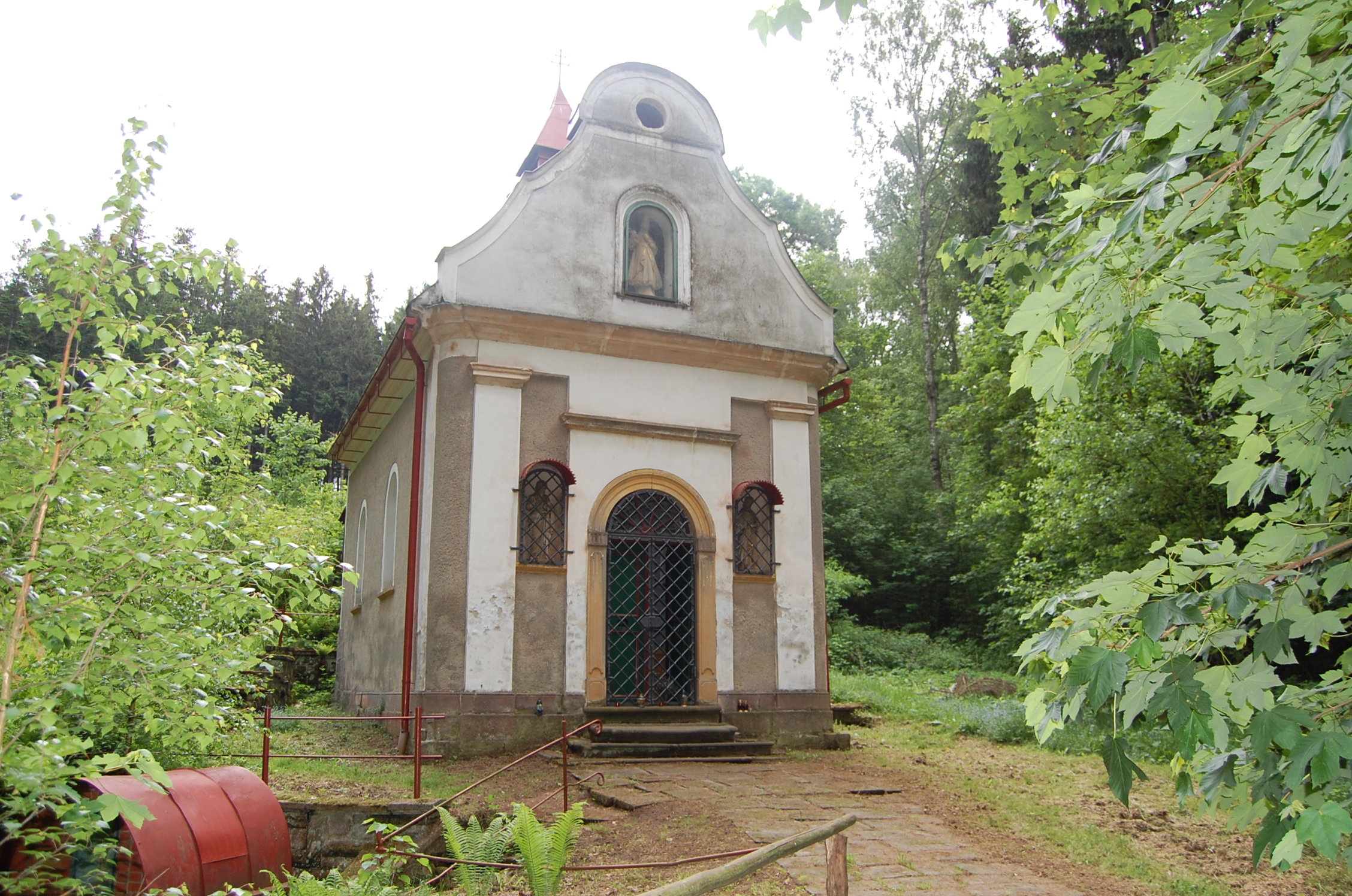 Božanov, kaple Nanebevzetí Panny Marie celkový pohled